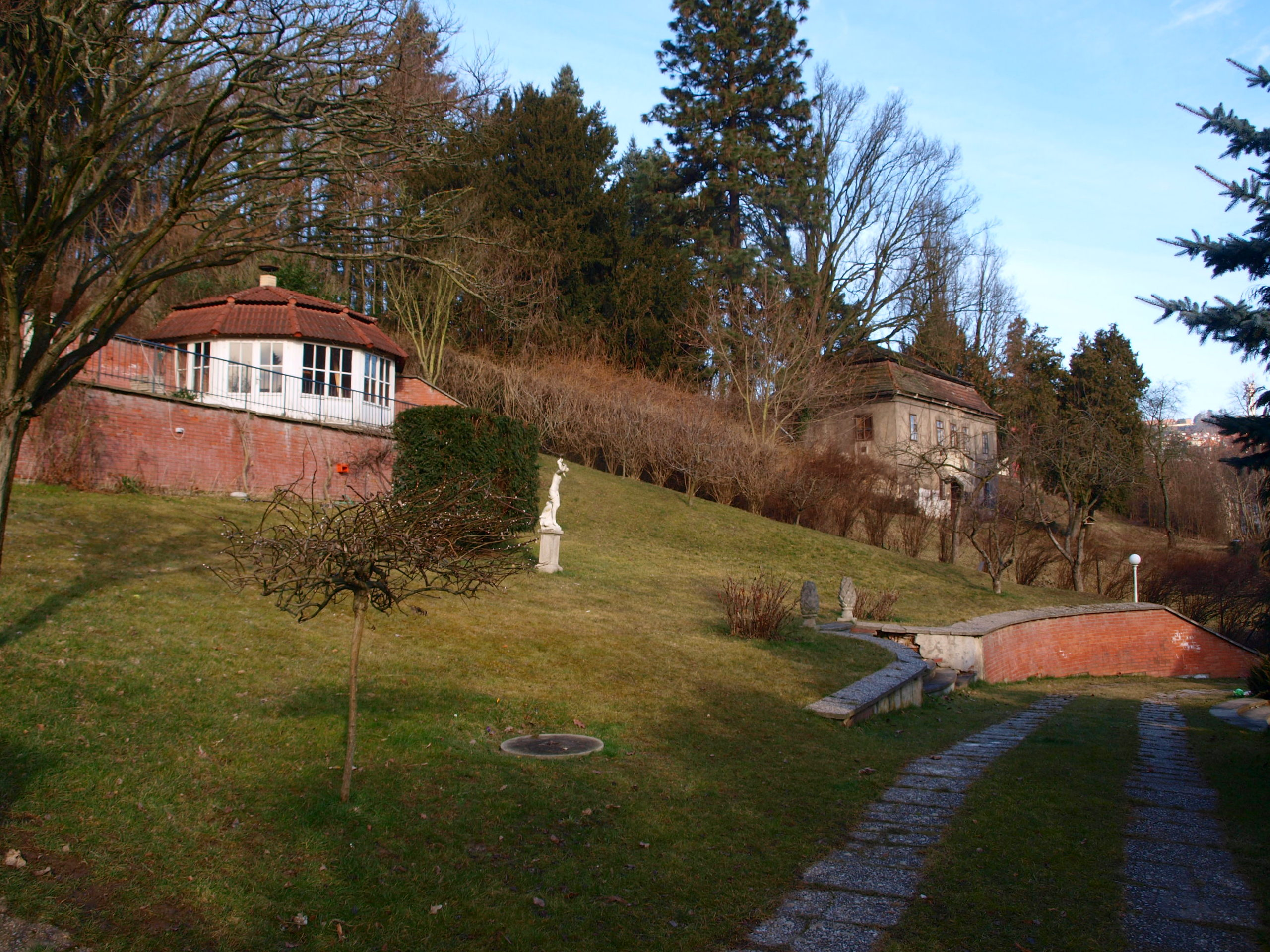 Usedlost Turbová